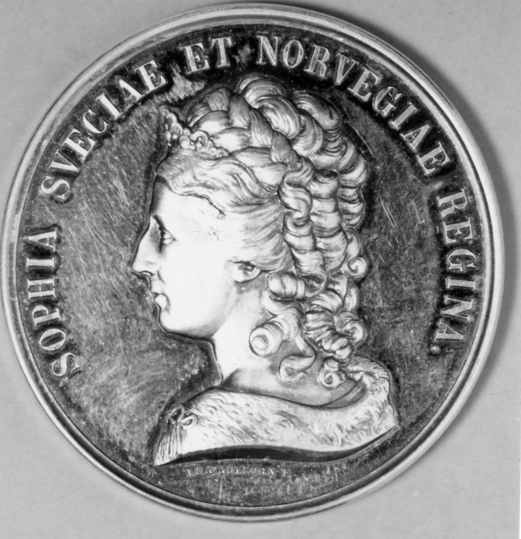 Medalj till minne av drottning Sophia. Framsidan: drottning Sophia avbildar i vänsterprofil. Frånsida: Lagerkrans